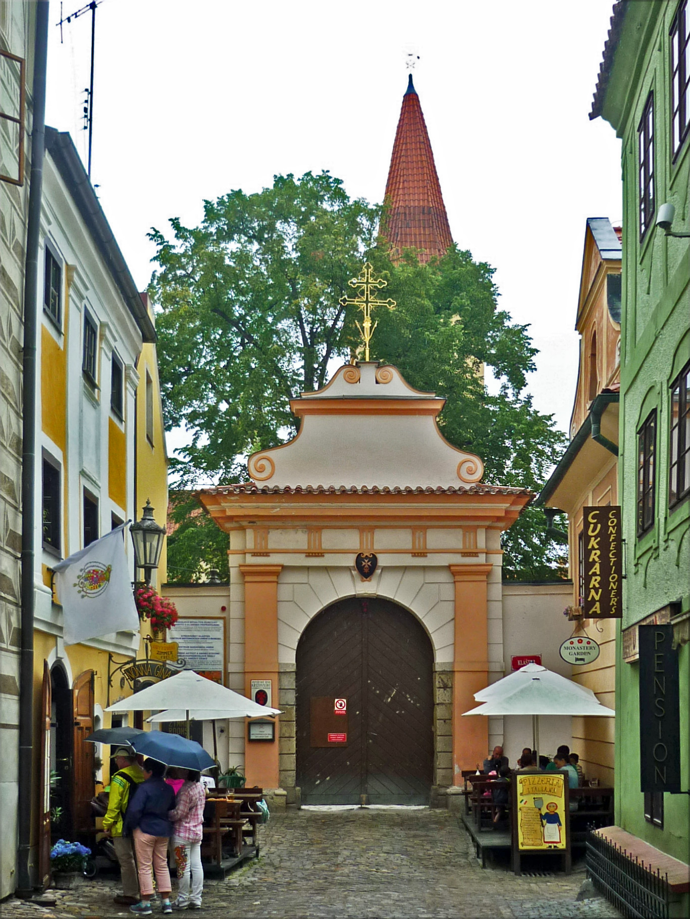 Pforte zum ehem. Minoritenkloster in Böhmisch Krumau (Český Krumlov) in Südböhmen, jetzt Kloster des Ritterordens der Kreuzherren mit dem roten Stern